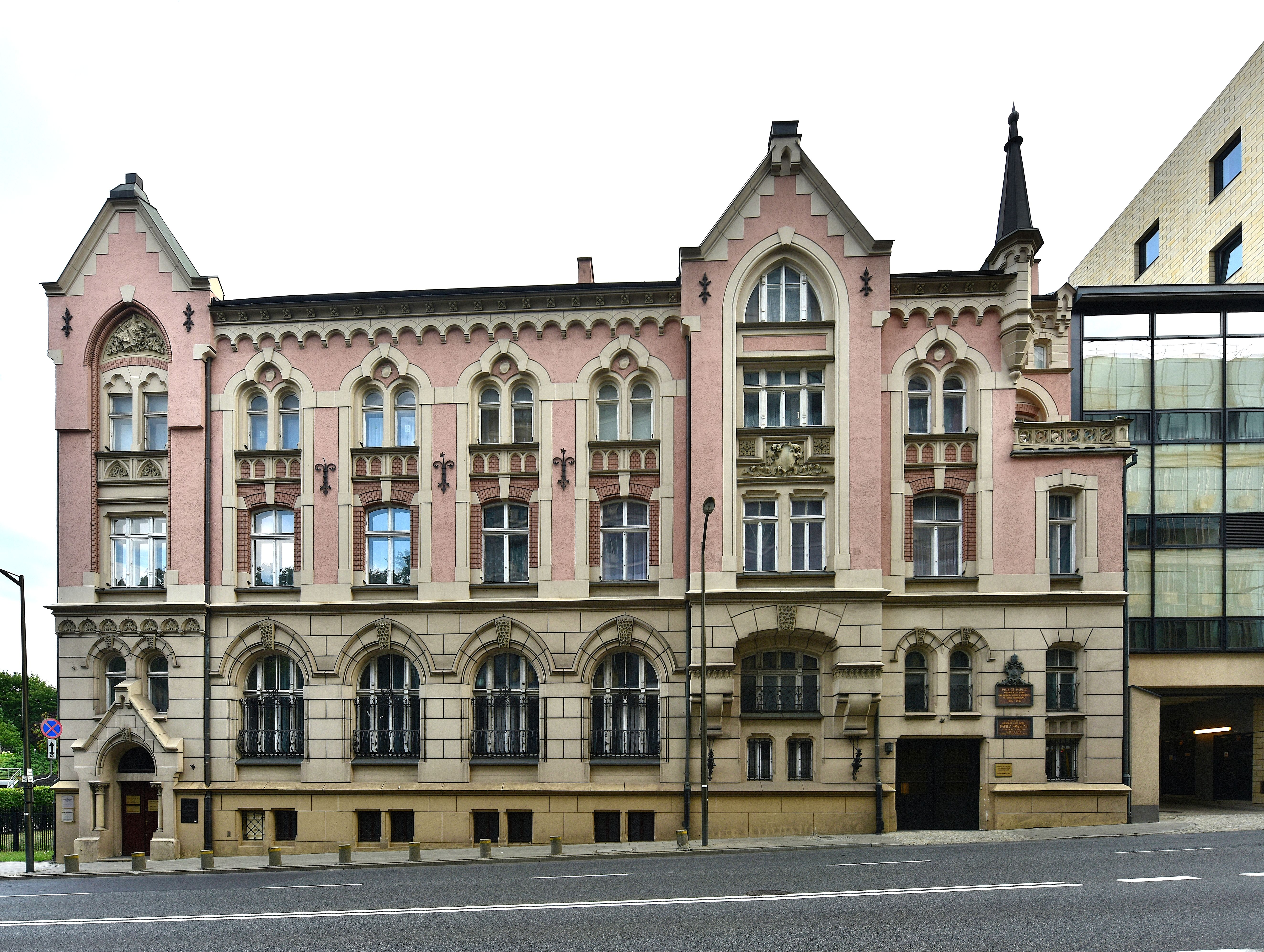 Dom Probostwa parafii św. Aleksandra przy ul. Książęcej 21 w Warszawie